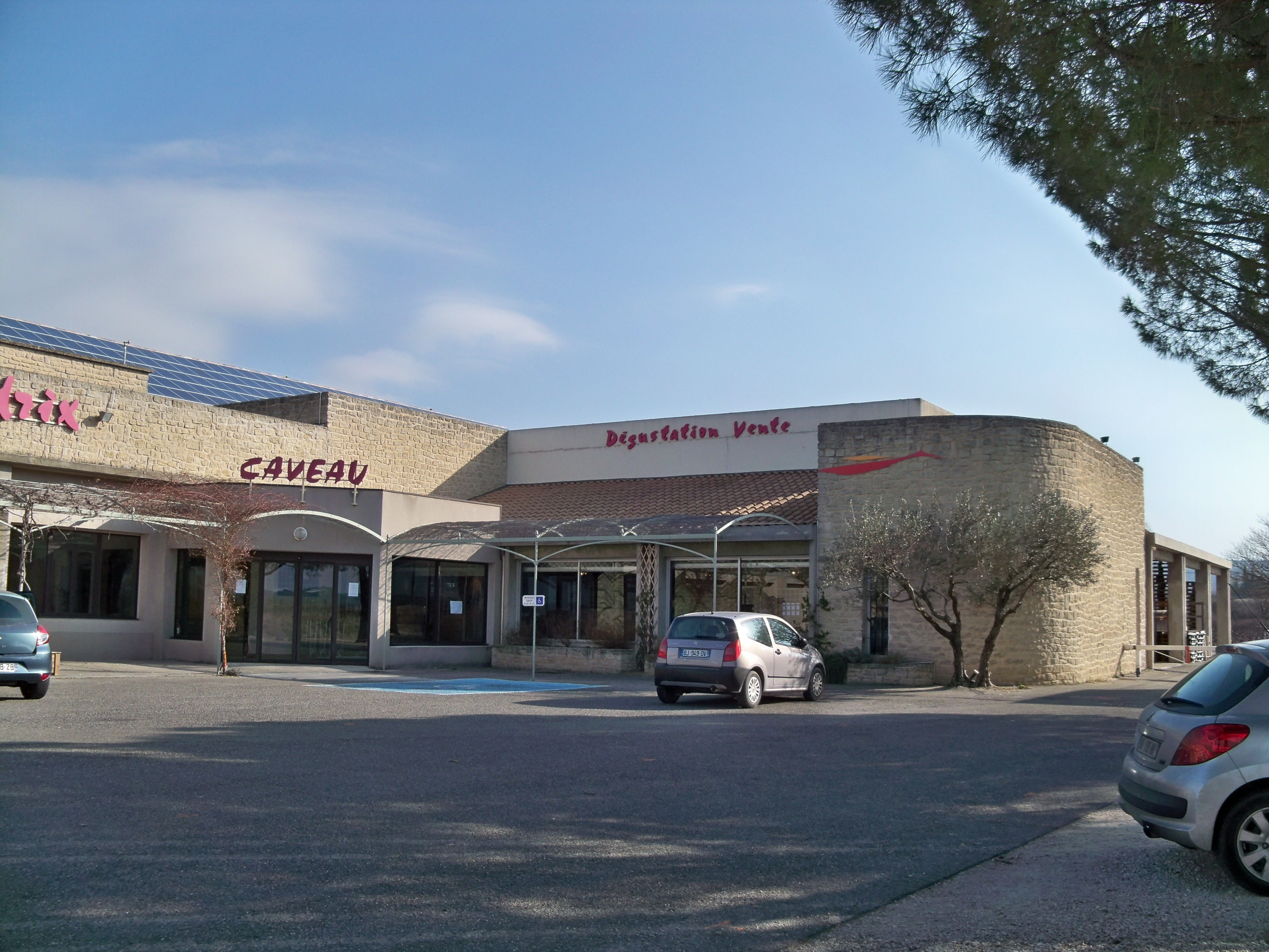 Cave coopérative de Mazan (84)